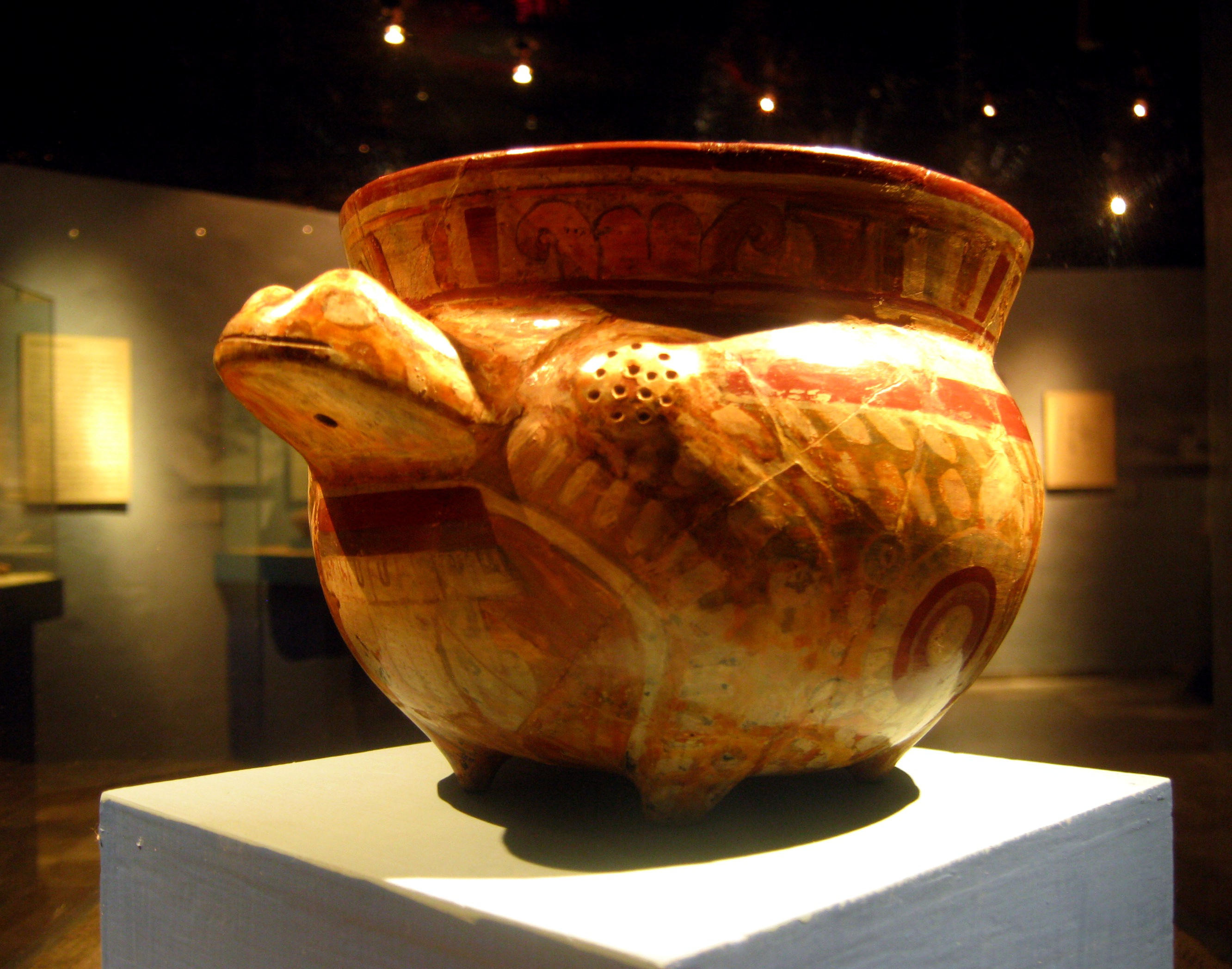 Vasija de cerámica pintada al estilo Mixteca-Puebla decorada con la imagen de una rana. Procediente de la Ofrenda 2 localizada en la Lumbrera 11 de la Catedral Metropolitana de la Ciudad de México. Corresponde al período Posclásico de Mesoamérica. El estilo Mixteca-Puebla de la ornamentación policroma de esta vasija tuvo gran difusión en Mesoamérica aunque se le considera característico de la región comprendida entre el valle de Puebla-Tlaxcala y la Mixteca.